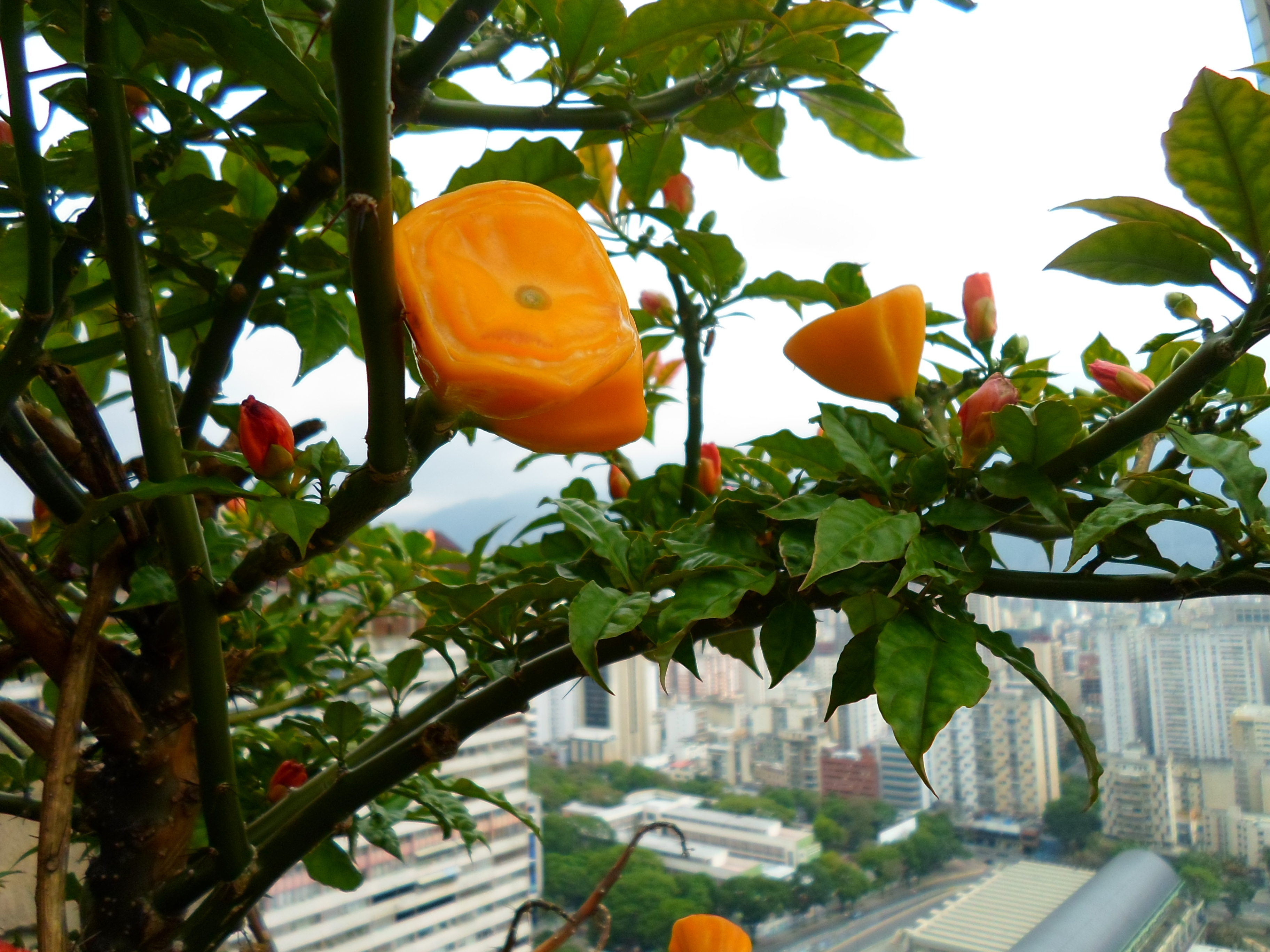 Pereskia bleo, Caracas, Venezuela